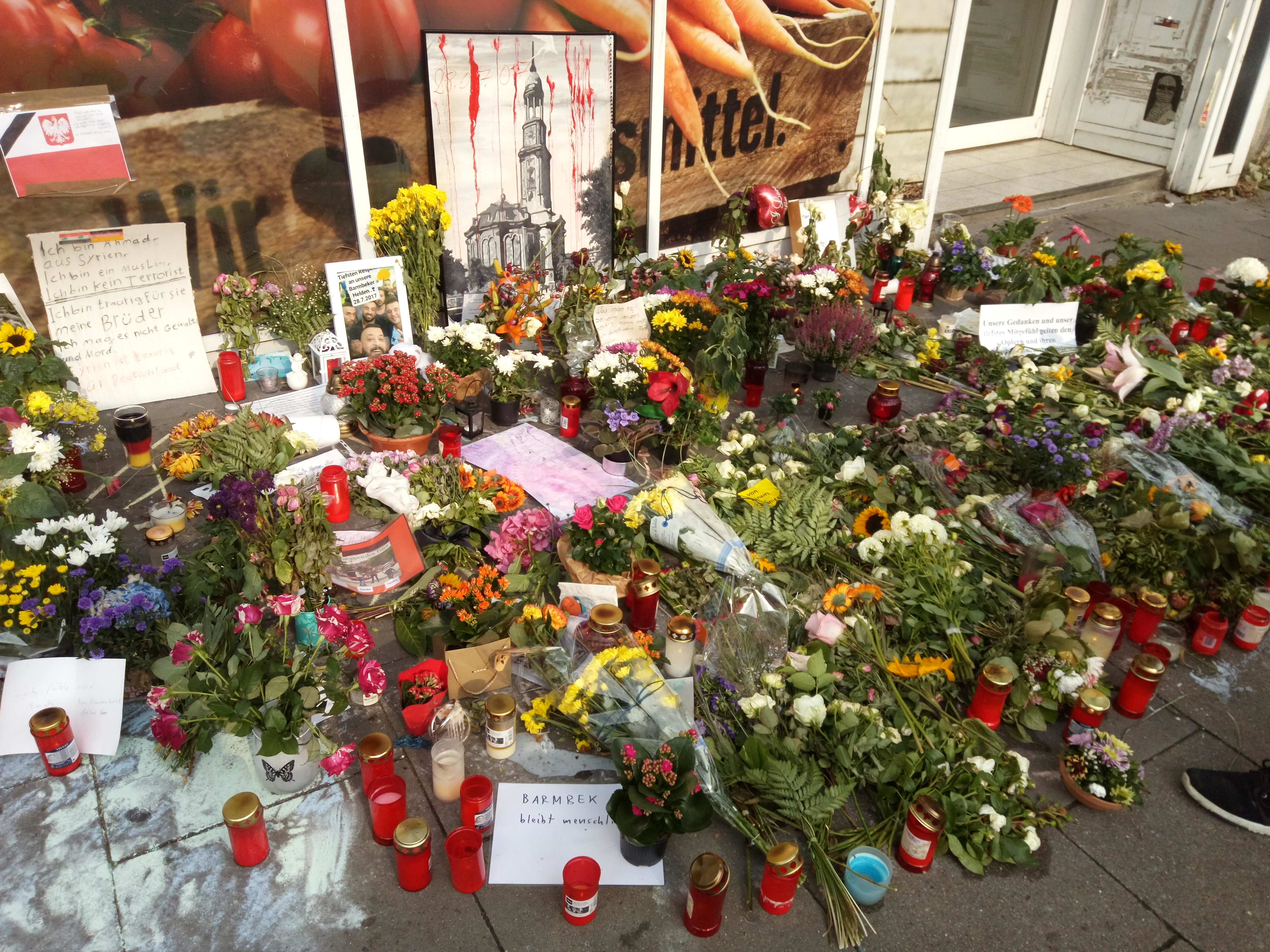 Blumen in Gedenken an die Opfer der Messeratacke in Hamburg.